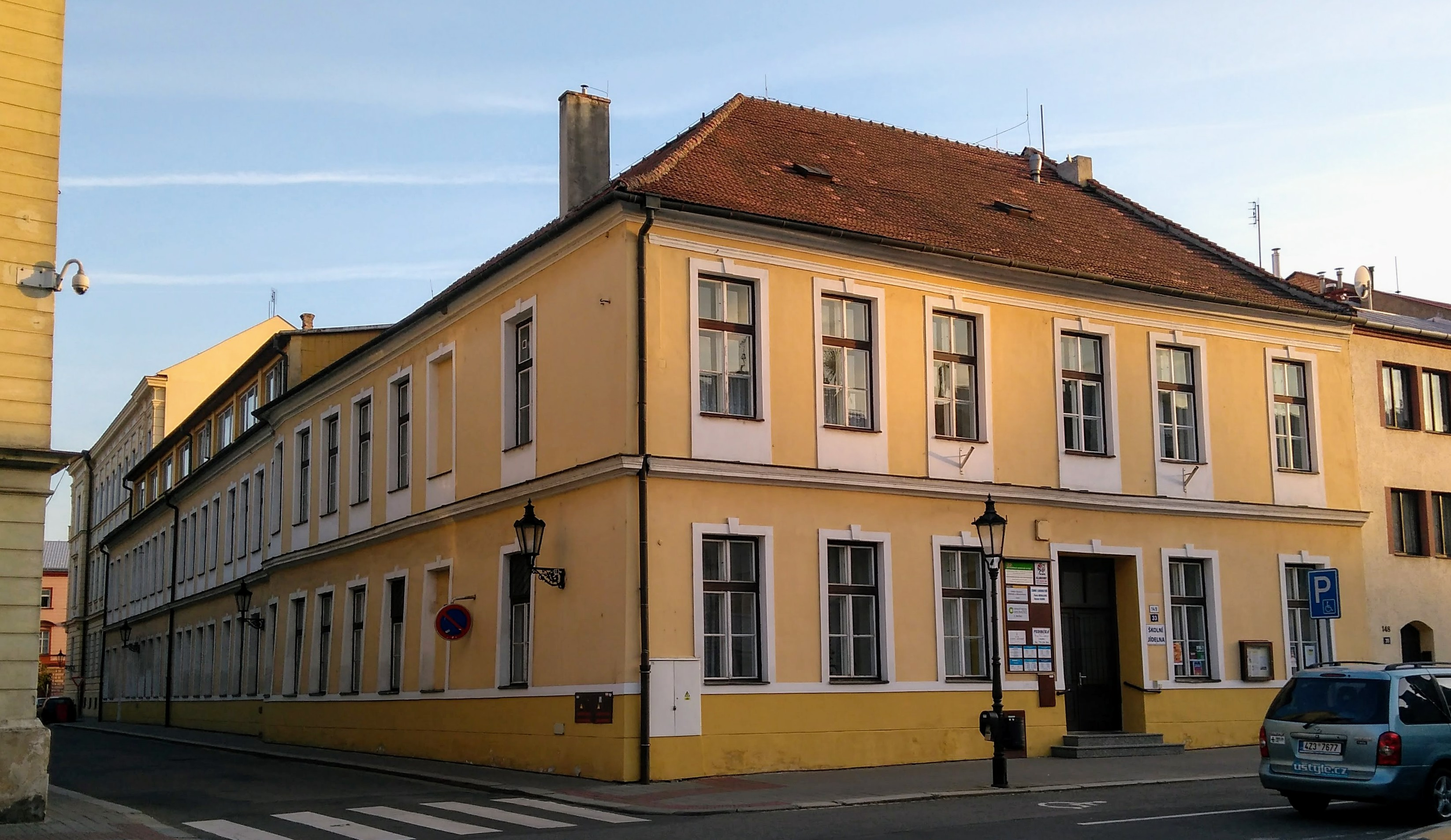 Riegrovo náměstí 149/33, Kroměříž, dům zvaný Trtinovský na rohu Riegrova náměstí a Šafaříkovy ulice